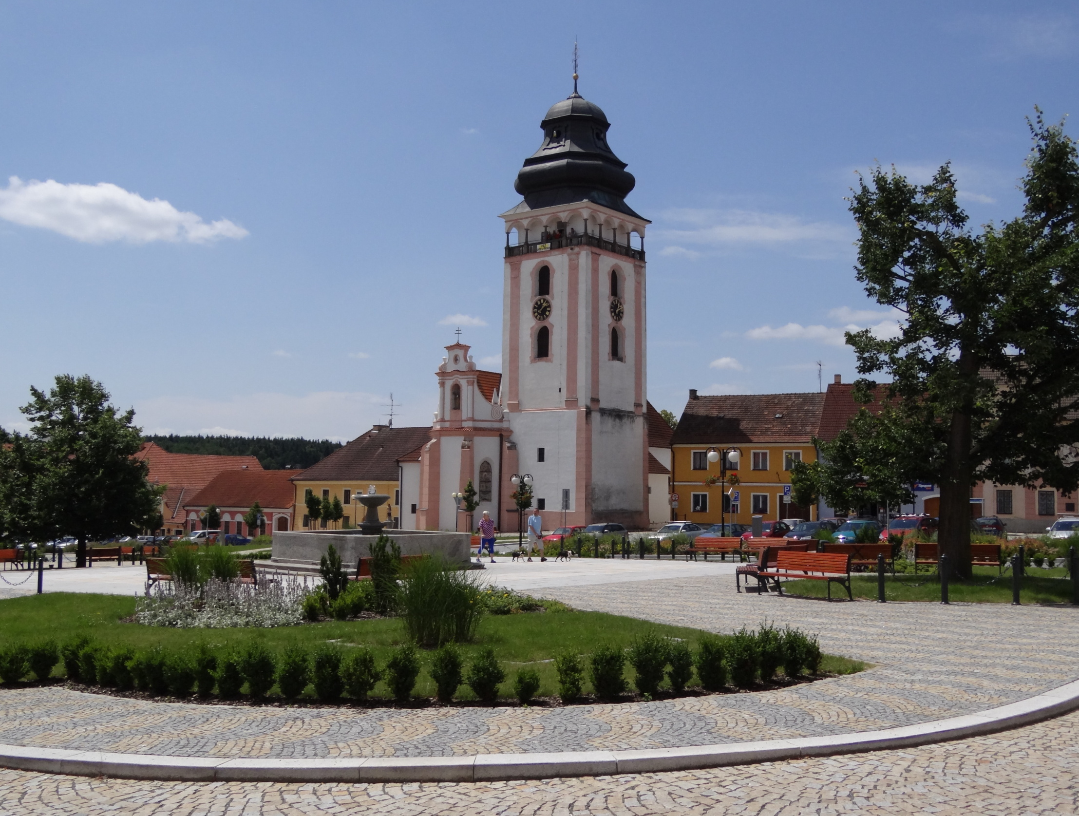 Kostel svatého Matěje, náměstí T. G. Masaryka 144, Bechyně.